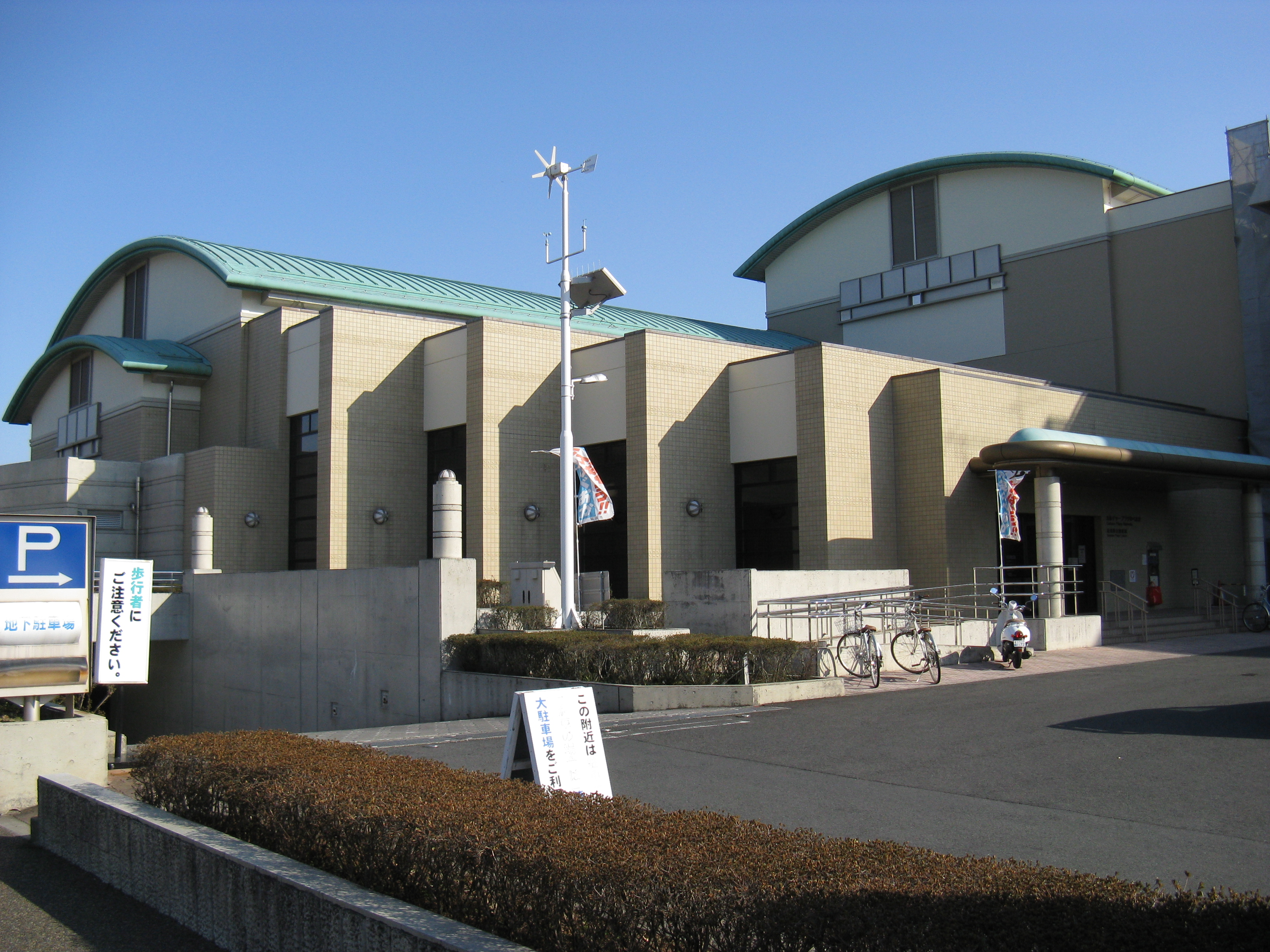 延岡市立図書館